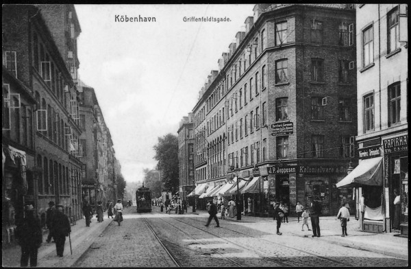 Griffenfeldsgade ved Tjørnegade